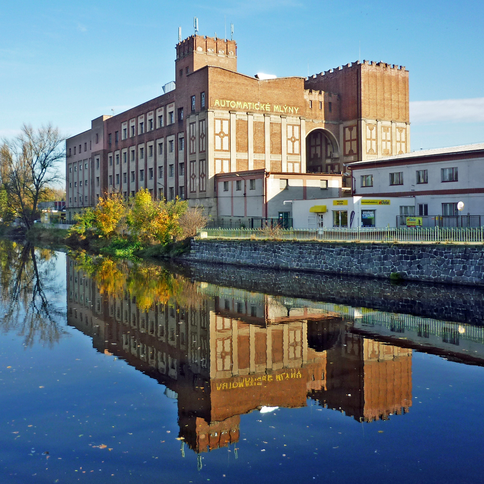 Automatische Mühlen in Pardubitz (Pardubice) in Böhmen